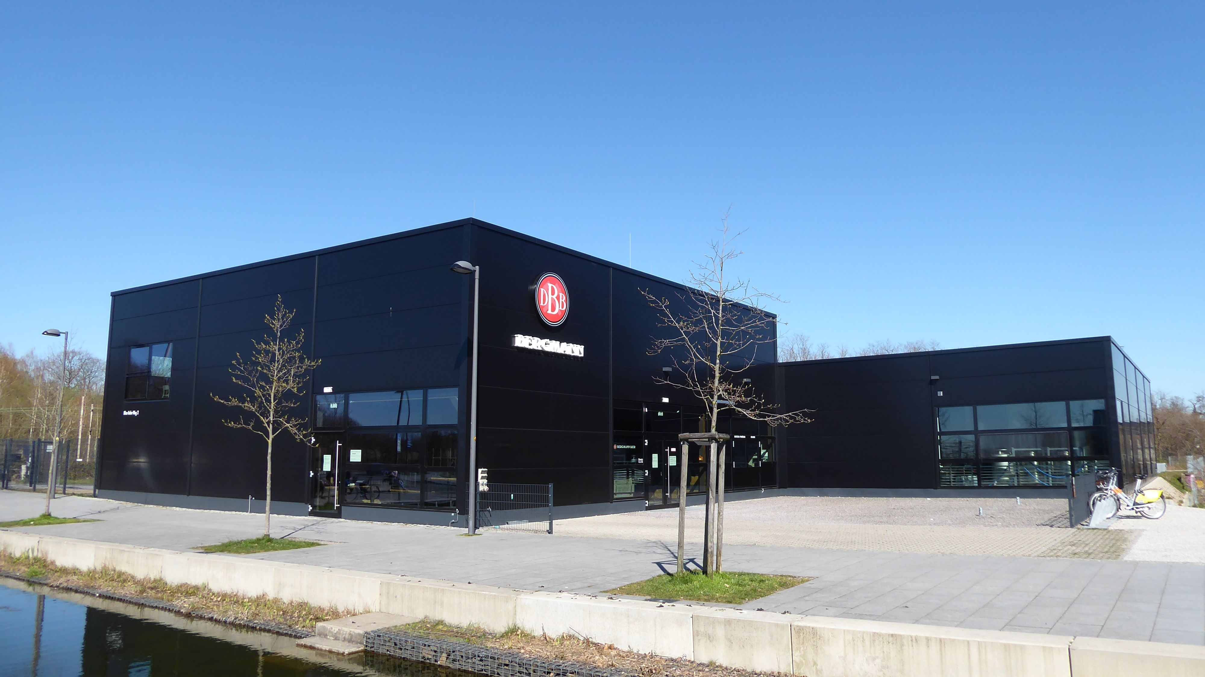 Sitz der Bergmann Brauerei am Elias-Bahn-Weg 2 in Dortmund, Hörde, Phoenix-West